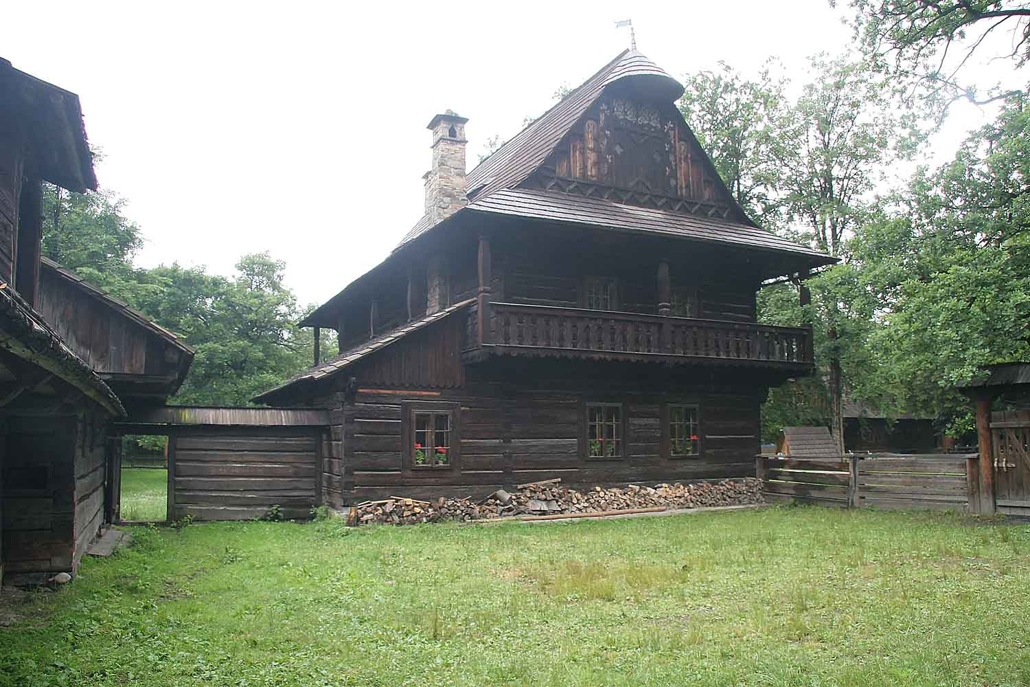 Skanzen Valašké muzeum v přírodě, Valašské městečko, Rožnov pod Radhoštěm, Czech republic Autor: Prazak date:30. 6. 2006